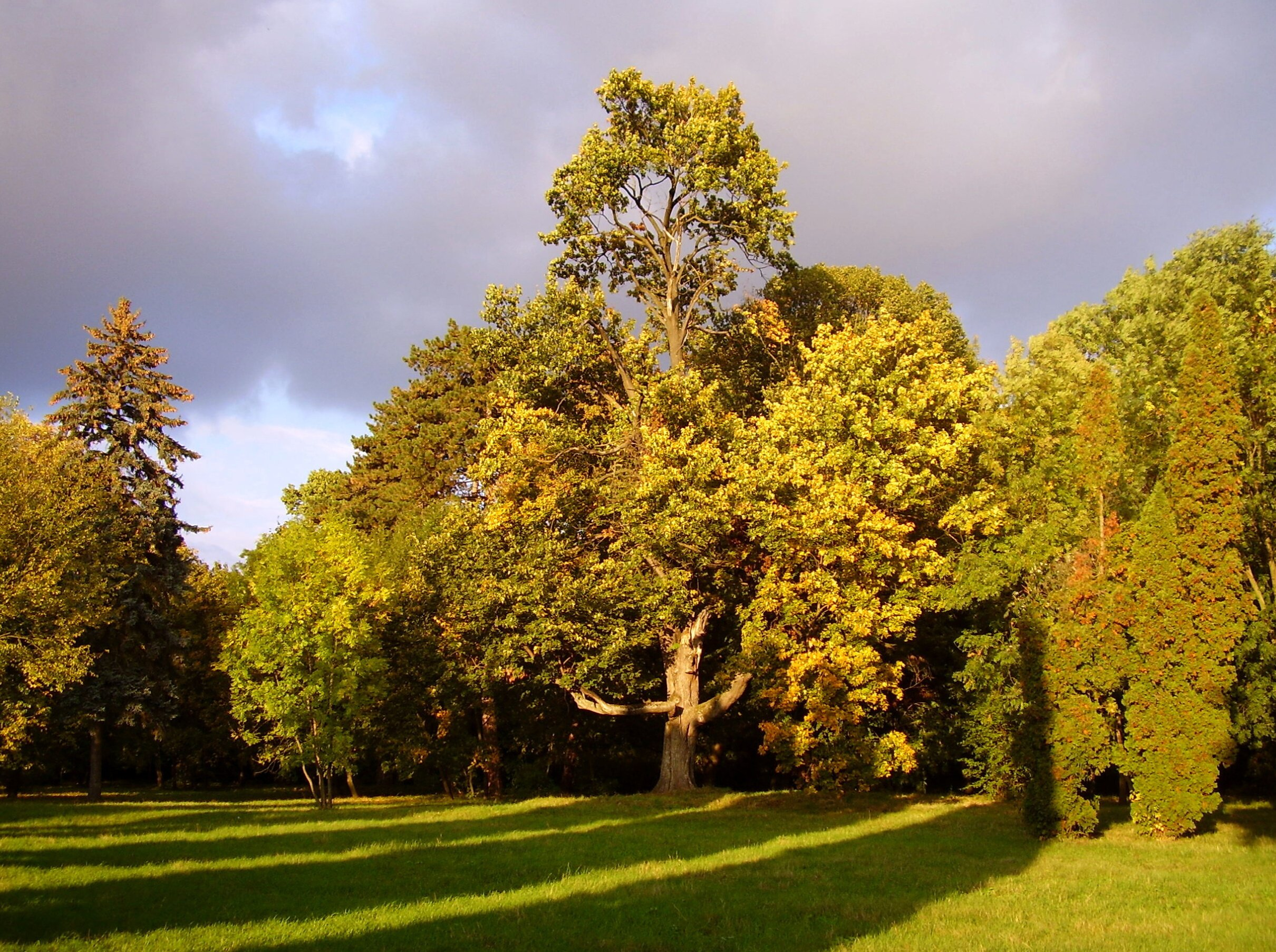 Park